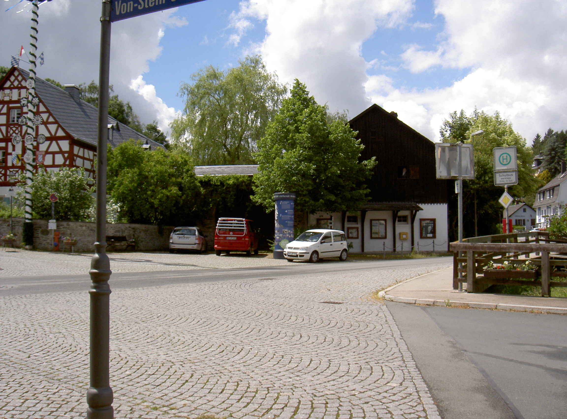 Joditz